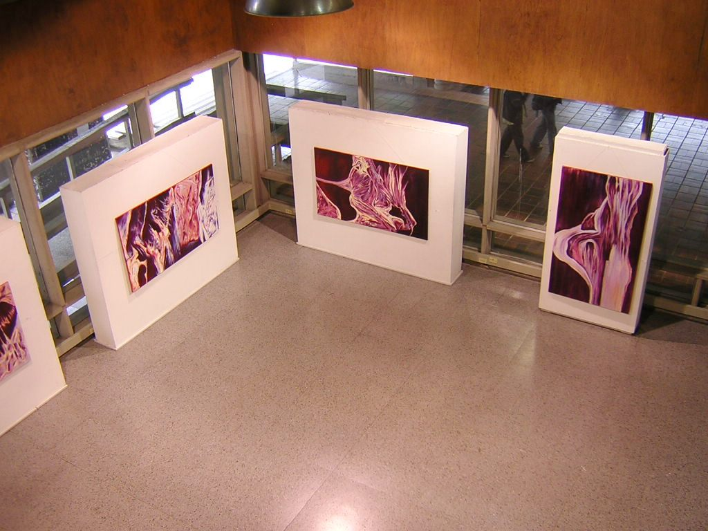 Sala de Exposiciones de la Biblioteca Central, Universidad de Antioquia, Medellín, Colombia (esta foto la tome yo, y la libero al dominio público)